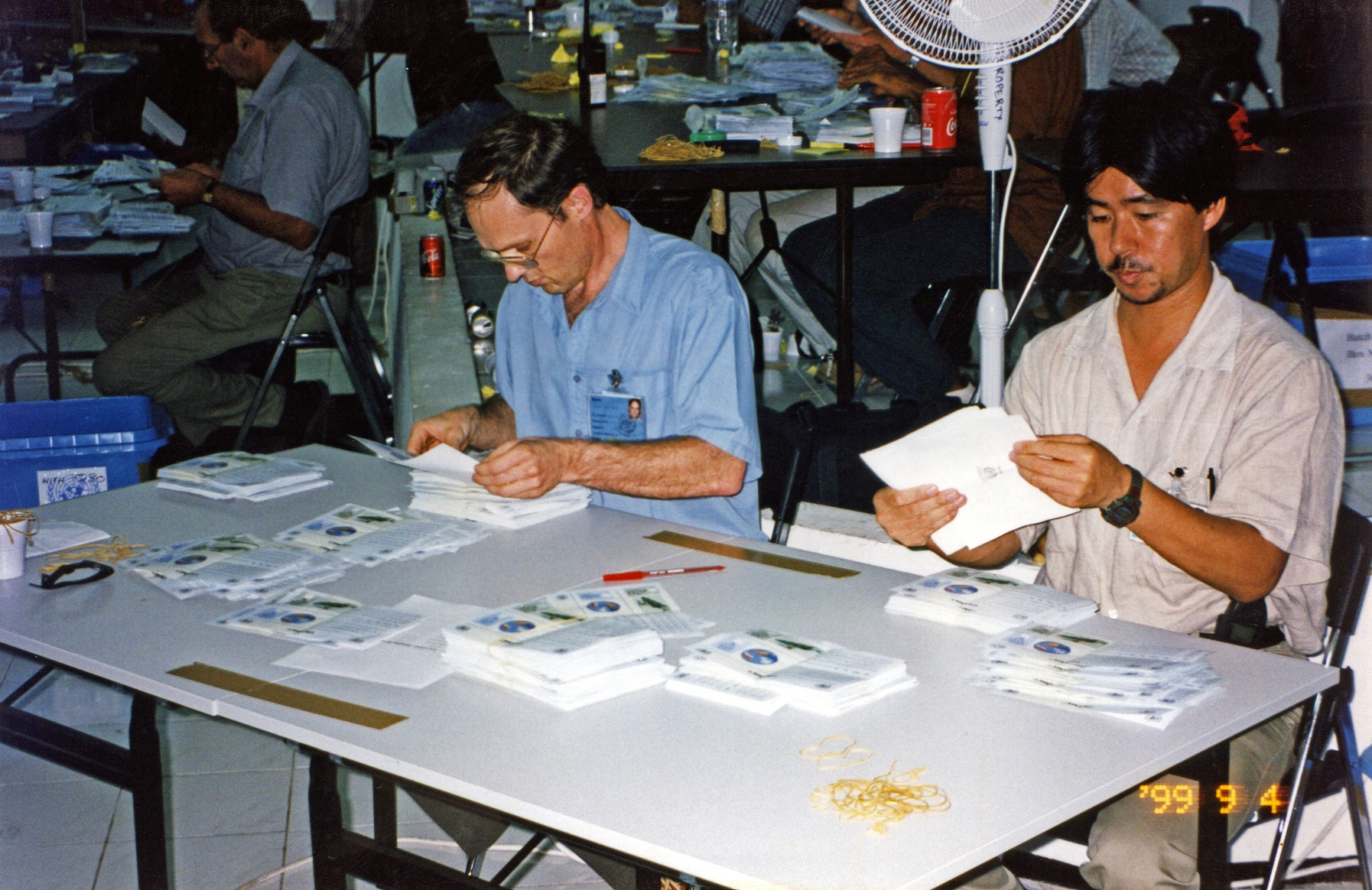 Zählung der Stimmzettel beim Unabhängigkeitsreferendum in Osttimor 1999